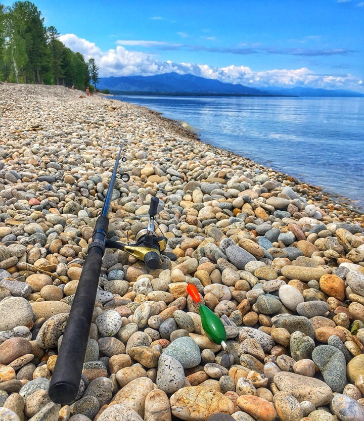 Telescopic rod. Lake Baikal. Eastern Siberia